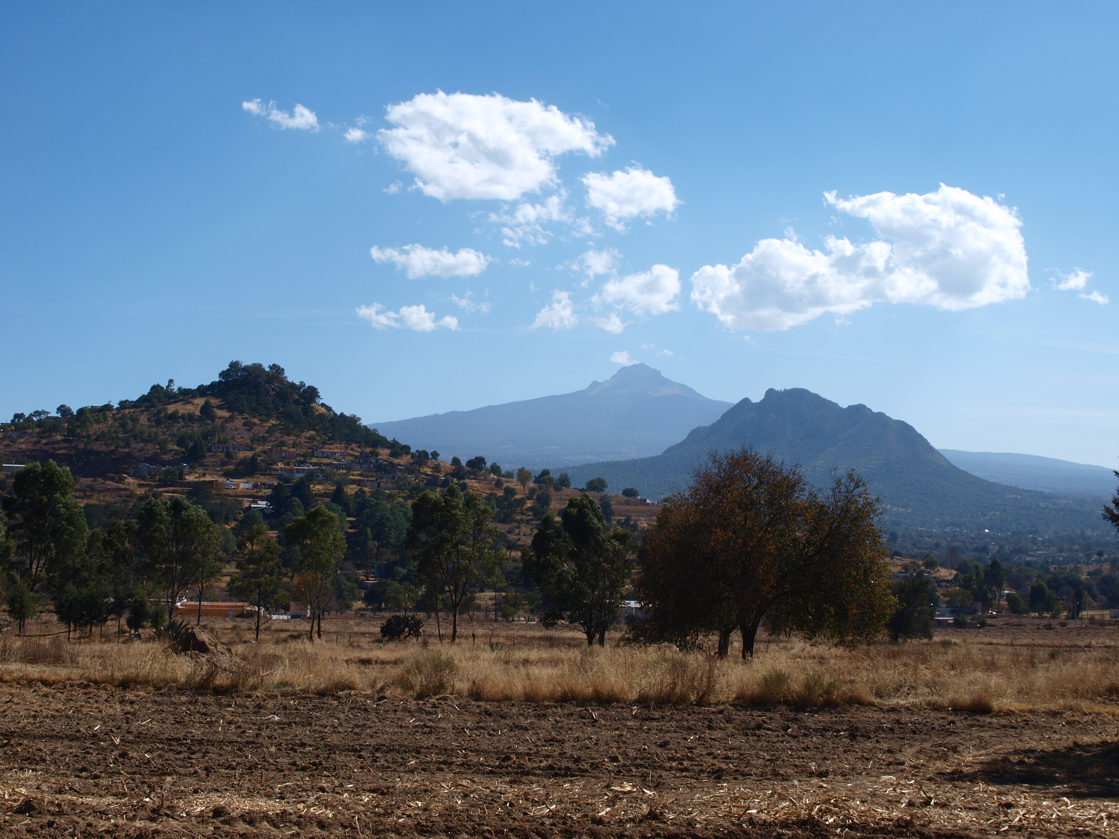 En la ruta del conquistador.